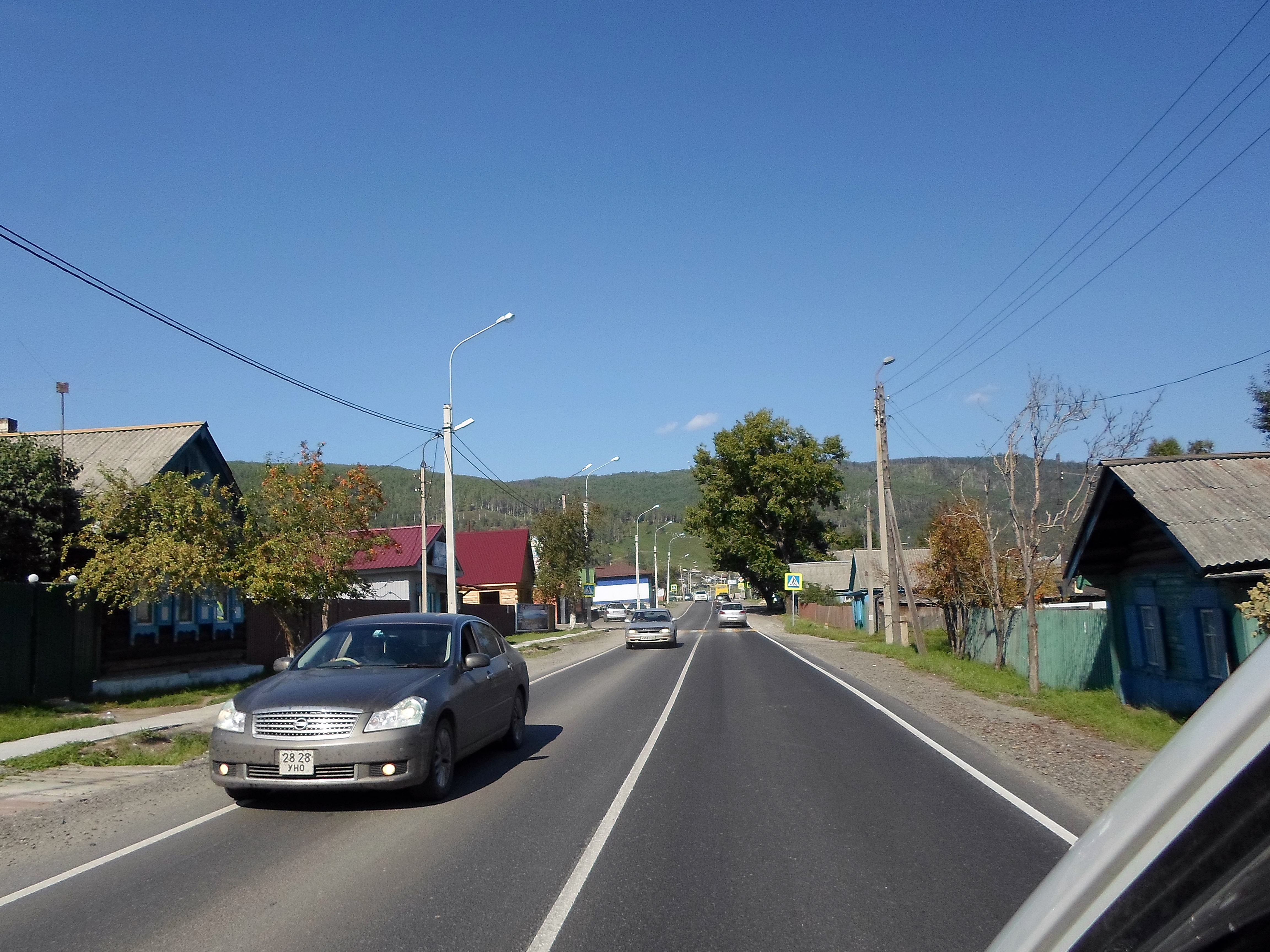 Федеральная автомагистраль Р258 "Байкал" (М55) в посёлке Култук. Слюдянский район Иркутской области.